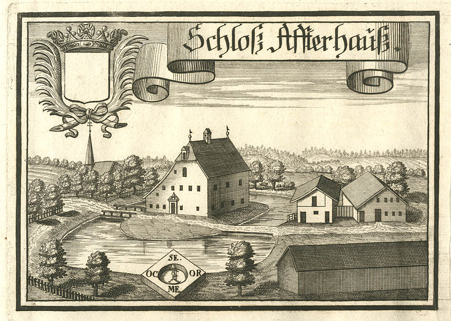 “Schloß Affterhauß” (Afterhausen), aus : Beschreibung des Churfürsten- u. Hertzogthumbs Ober- und Nidern Bayrn. Rentamt Landshut. – Gericht Pfarrkirchen, 1723